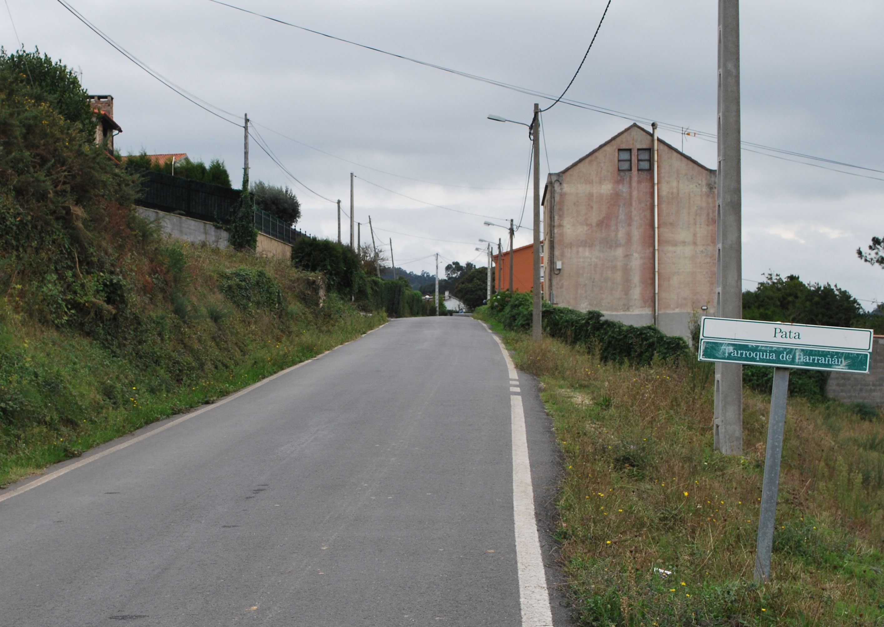 Acceso DP 0506 Pata Barrañán Arteixo A Coruña